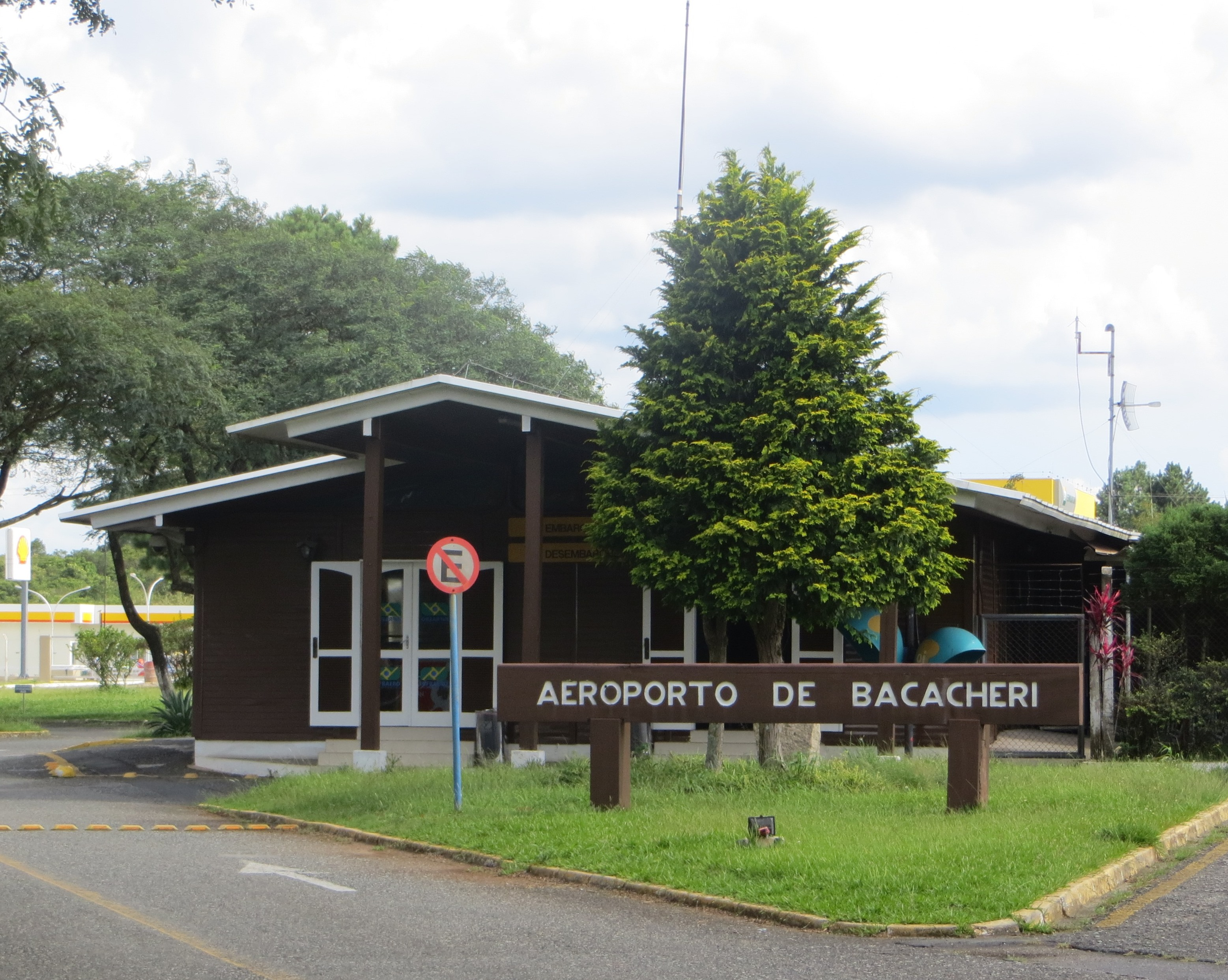 Sede do Aeroporto do Bacacheri, no bairro homônimo, em Curitiba, capital do Paraná, região Sul do Brasil.